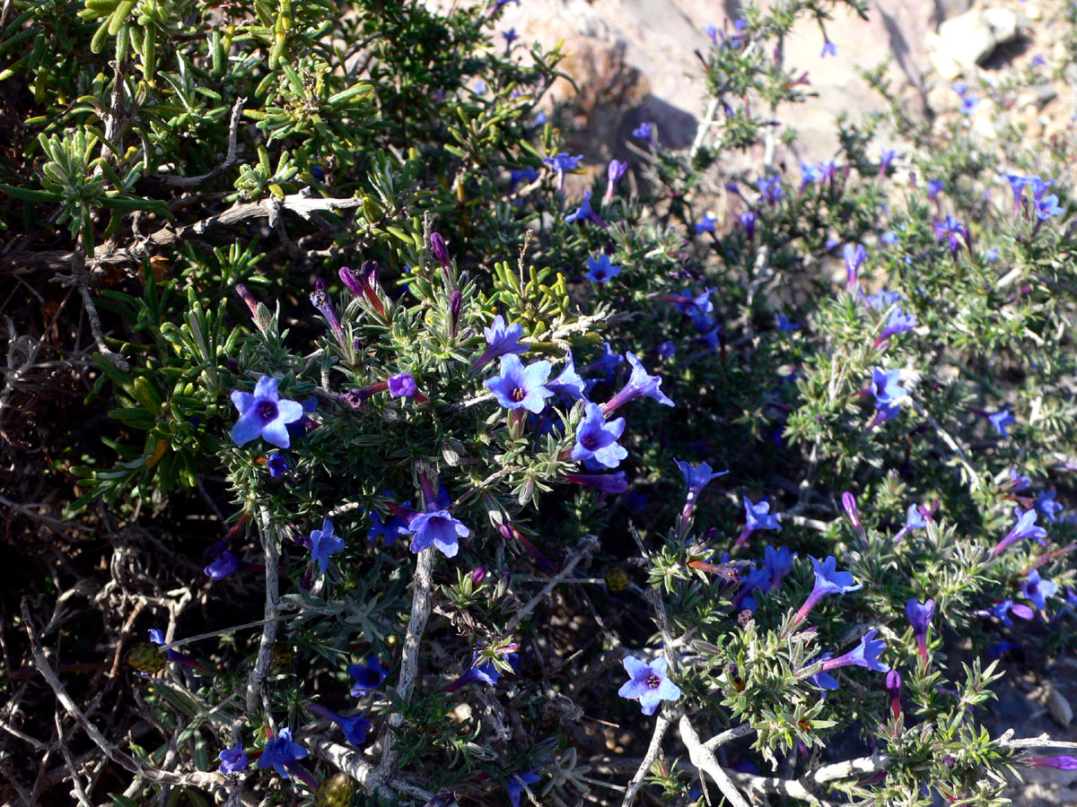 Lithodora fruticosa en el Puntal del Moco (Parque Natural de la Sierra de la Muela) en Cartagena (Spain)